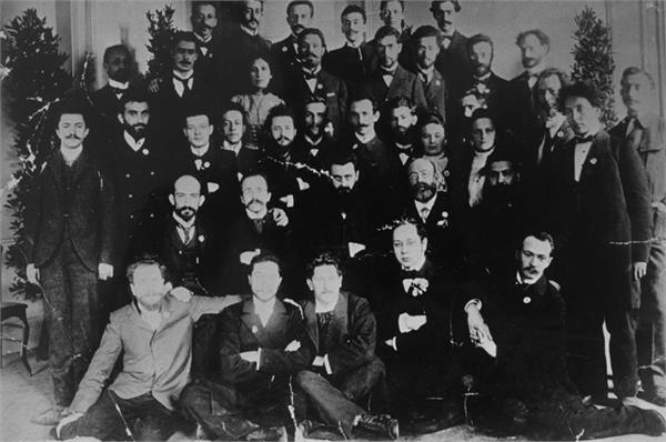 בזל - משתתפי הקונגרס הציוני החמישי